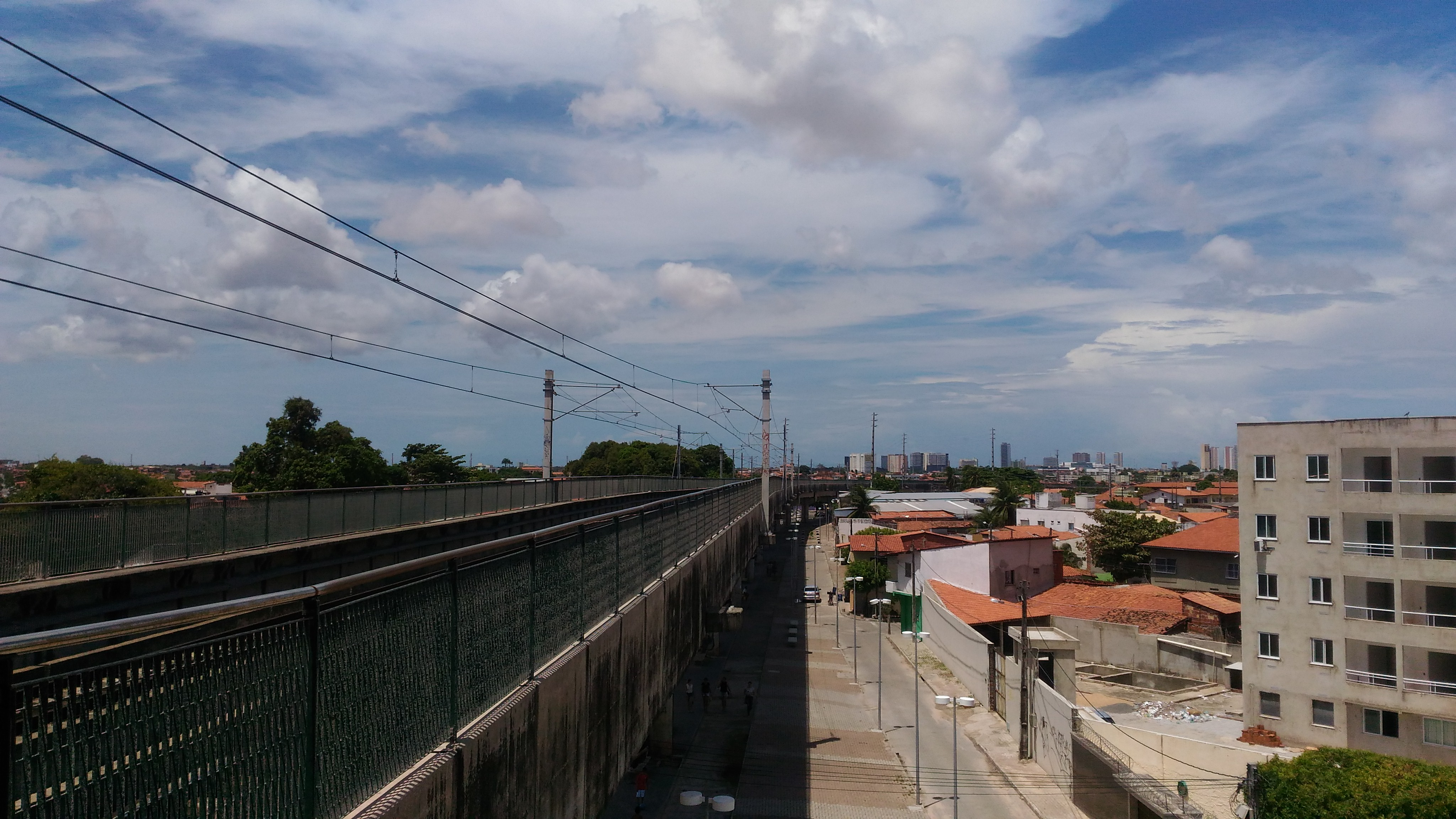 Elevado da Linha Sul do metrô de Fortaleza visto da estação JK.